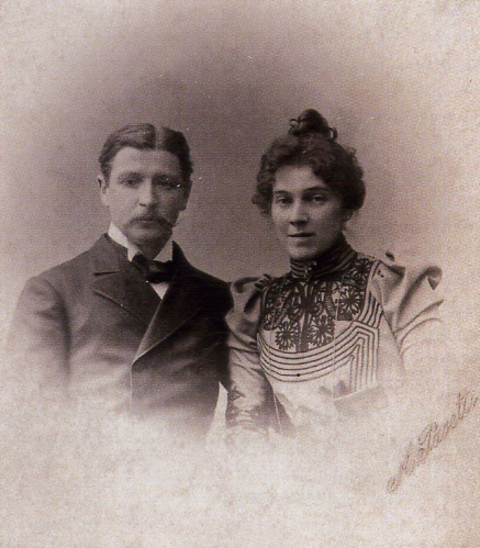 М.А. Врубель и Н.И. Забела